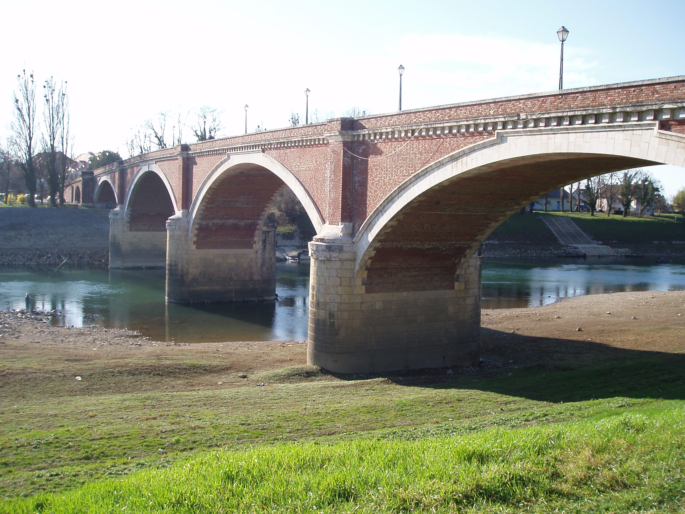 Sisak, stari most